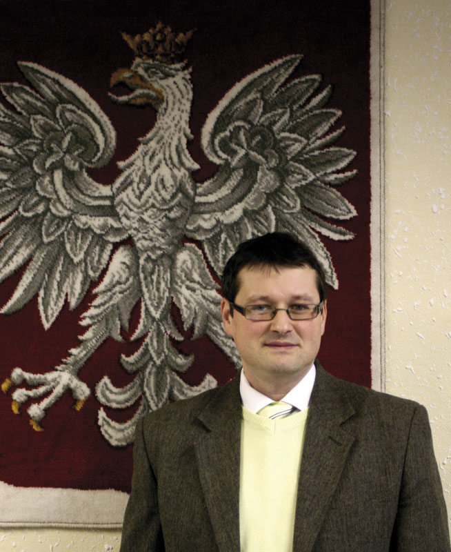 Józef Szymeczek